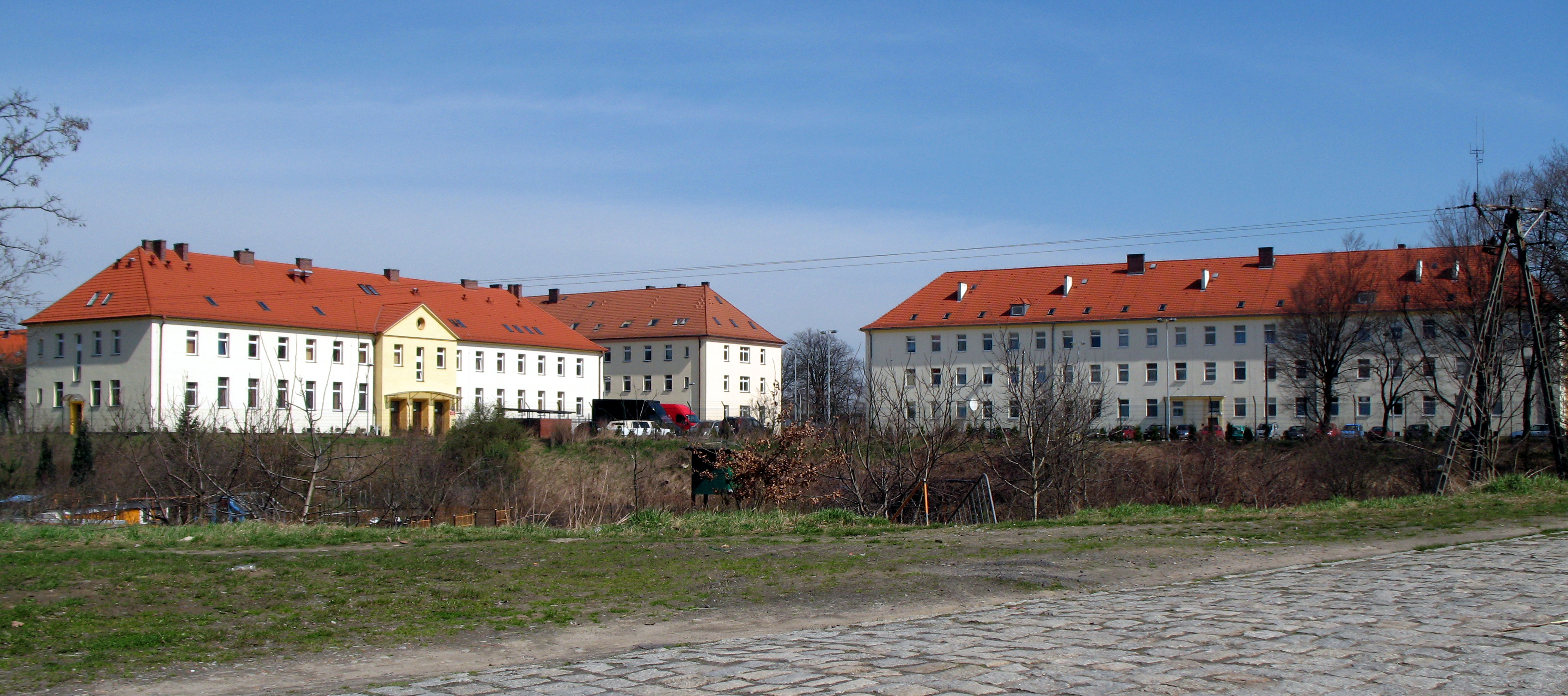 Wrocław, Kozanów - ul. Połbina, stare koszary.